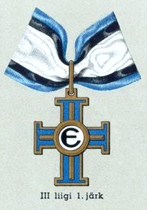 Vabadurist